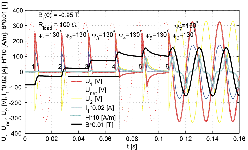 Spannung über Magnetfluss über Feldstärke über Strom beim TSR-Einschaltverfahren